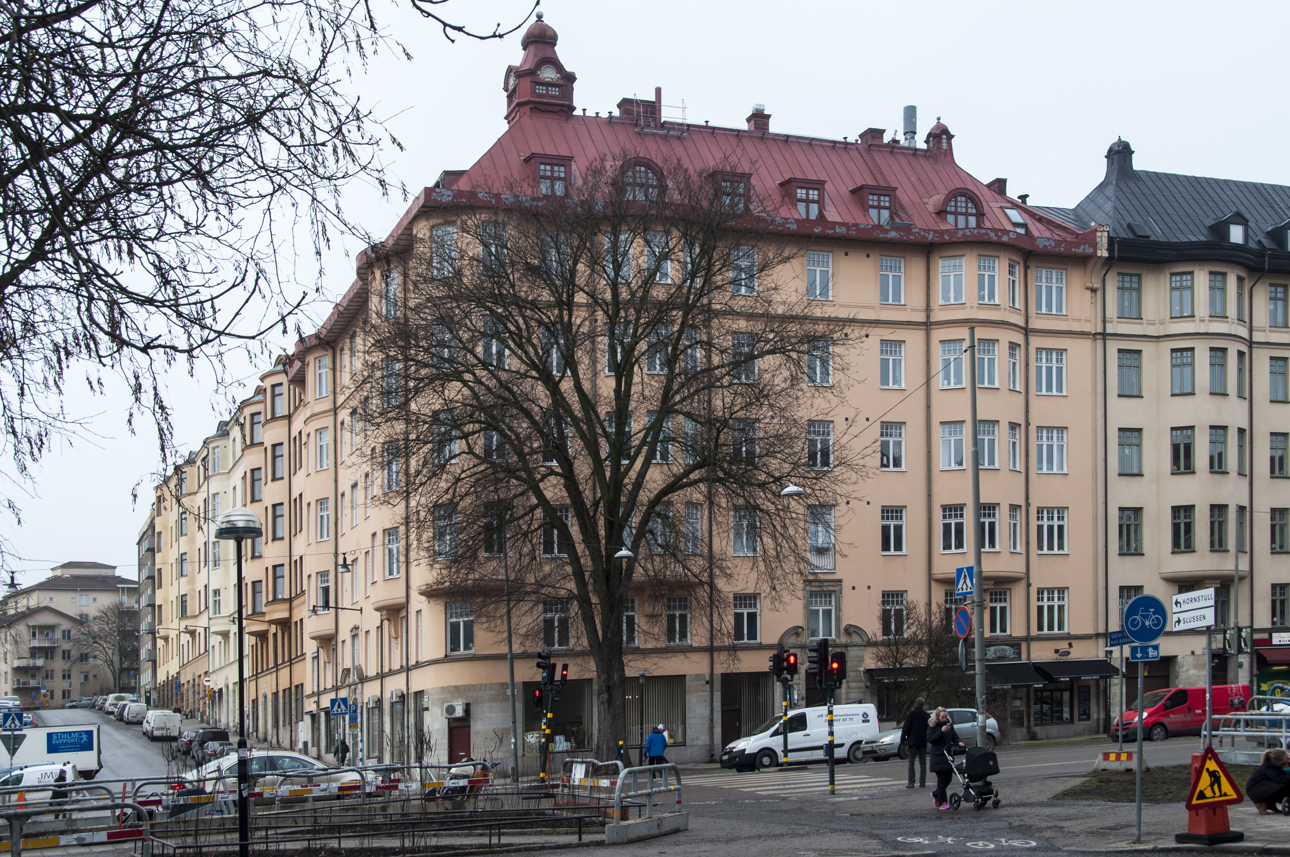 Pålen 7, Krukmakargatan 42, Ringvägen 14, Nybyggnadsår 1907 - 1908, Dorph & Höög (Arkitekt) Fastighets AB Prismat (Byggherre) Fredrik Rappe (Byggherre) H. Risberg (Byggherre) J. L. Lundin (Byggmästare) J. L. Lundin (Byggherre) Wiktor Hagberg (Byggherre)